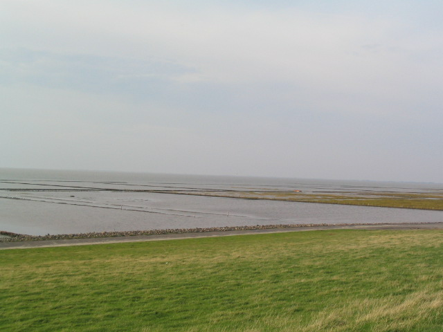 Landgewinnung beim Hedwigenkoog in Dithmarschen. Vom Deich aus fotografiert, Flut.